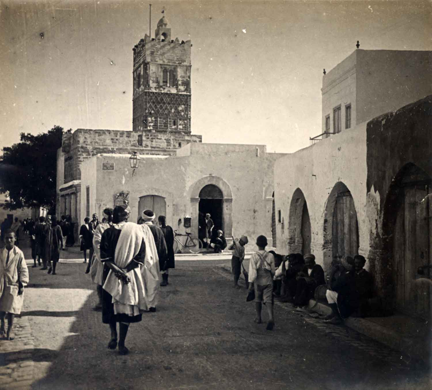 Soliman (Tunisie) La mosquée Malékite